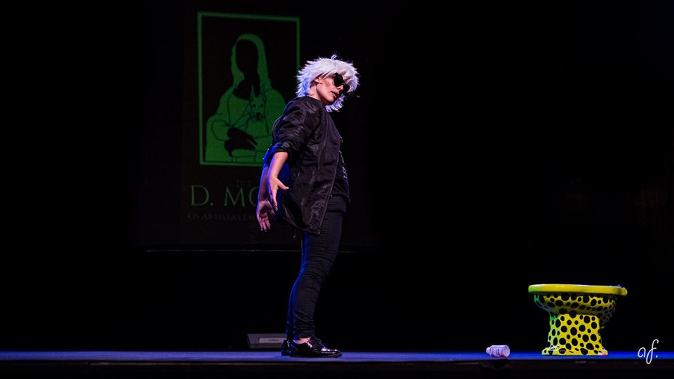 Espectáculo Kusama e Warhol: o maior roubo da pop, das Produções D. Mona.